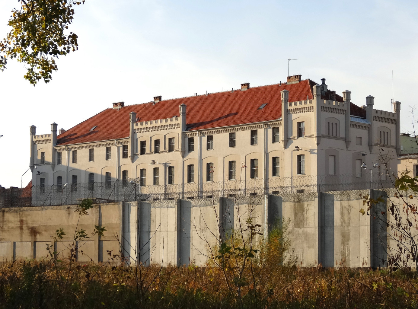 Więzienie w Bydgoszczy - starym Fordonie